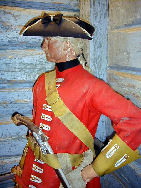 Norsk dragon fra 1700-tallet